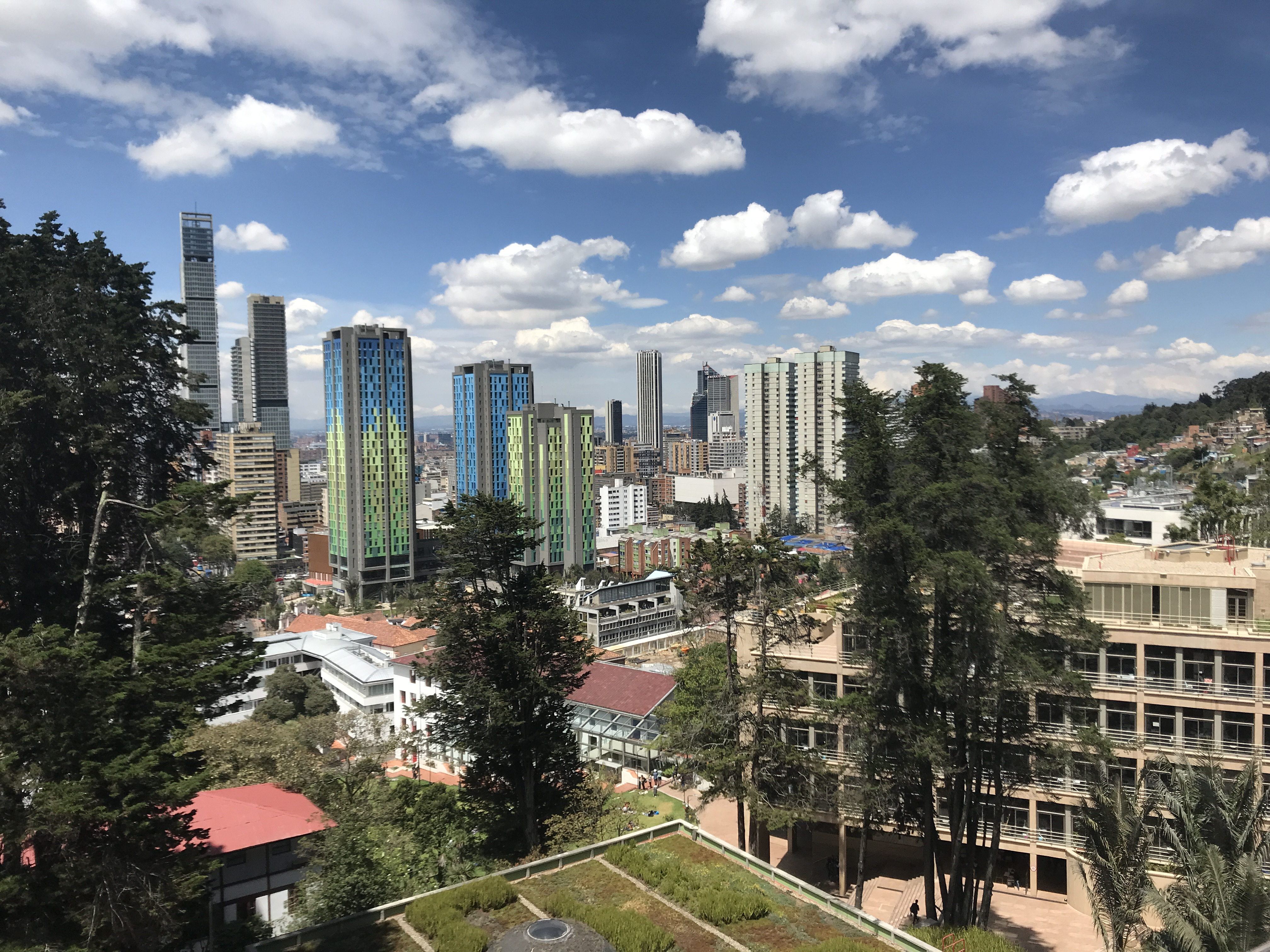 Campus urbano de la Universidad de los Andes